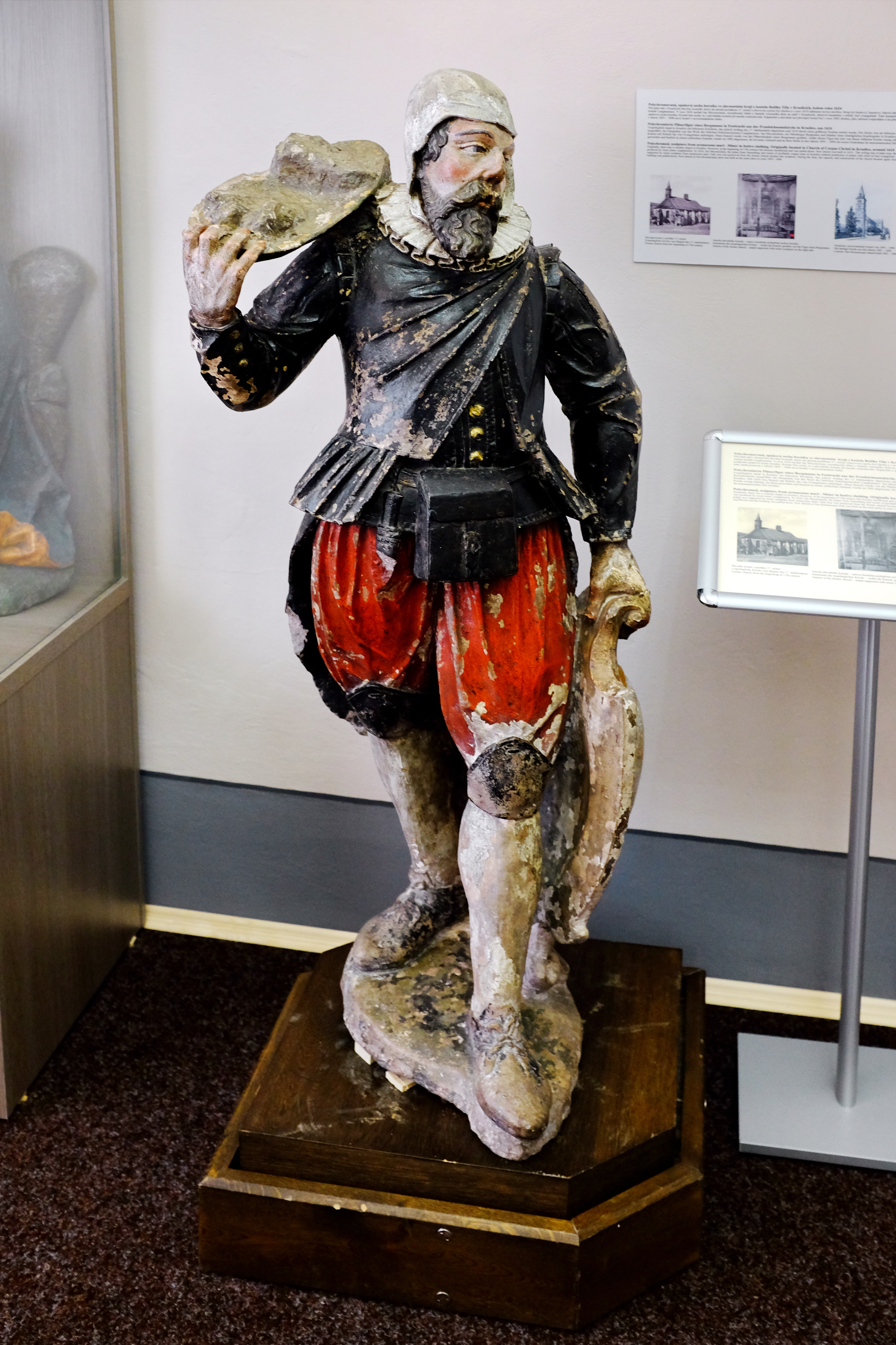 Polychromovaná, opuková socha horníka ve slavnostním kroji, kolem roku 1624, z původního, zbořeného kostela Božího Těla v Kraslicích, nachází se v expozici muzea v Sokolově